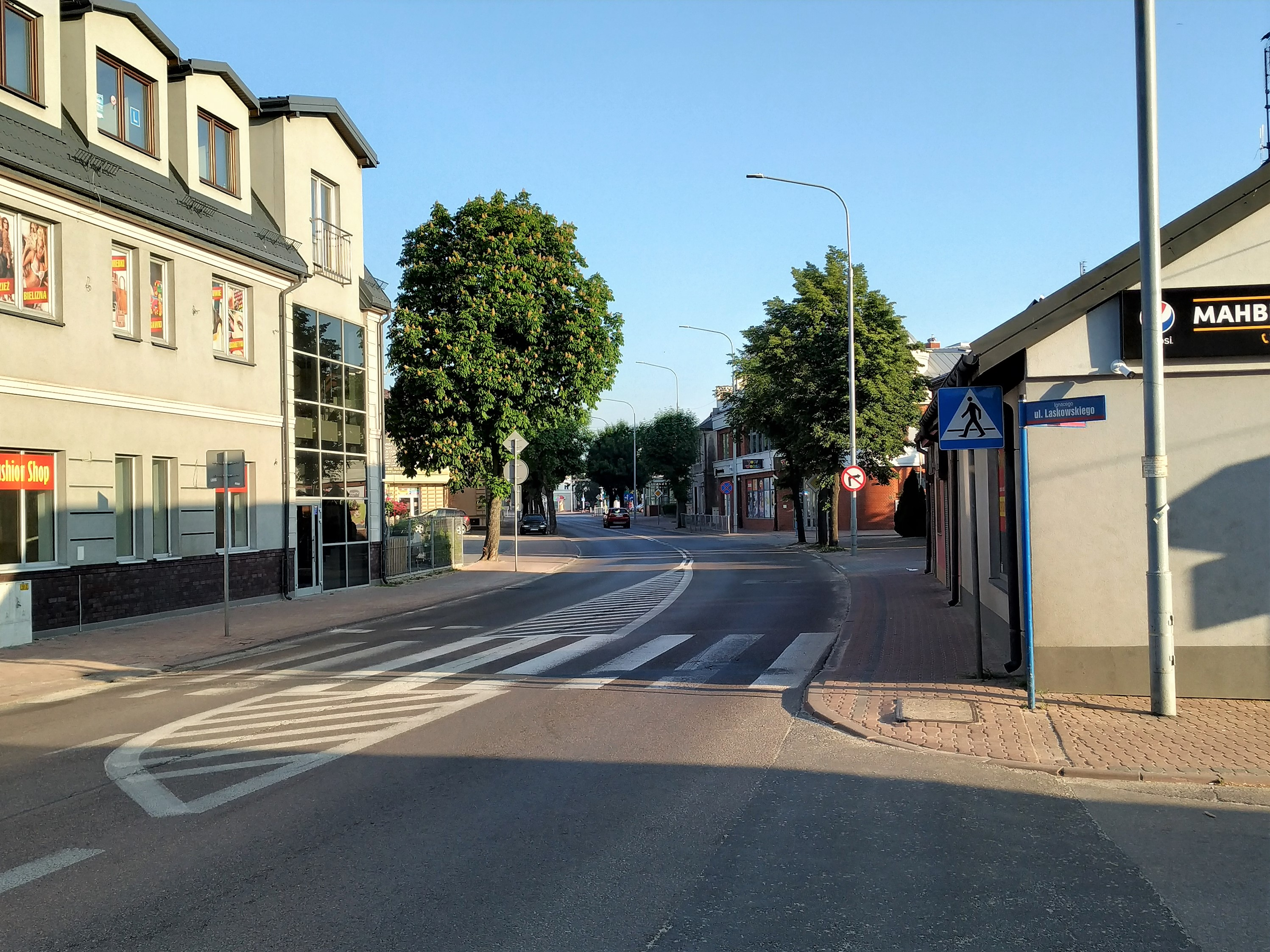 Ulica ks. kard. Stefana Wyszyńskiego w Łukowie